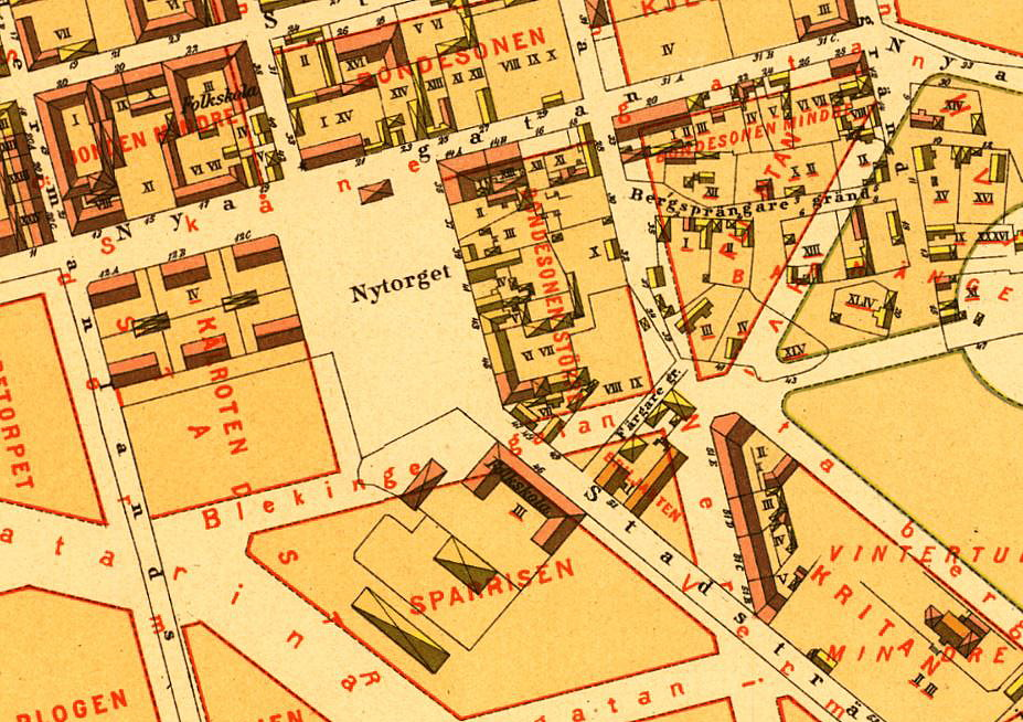 Nytorget och kvartereten Bondesonen större och mindre, Bondesonen, Sparrisen m.fl.